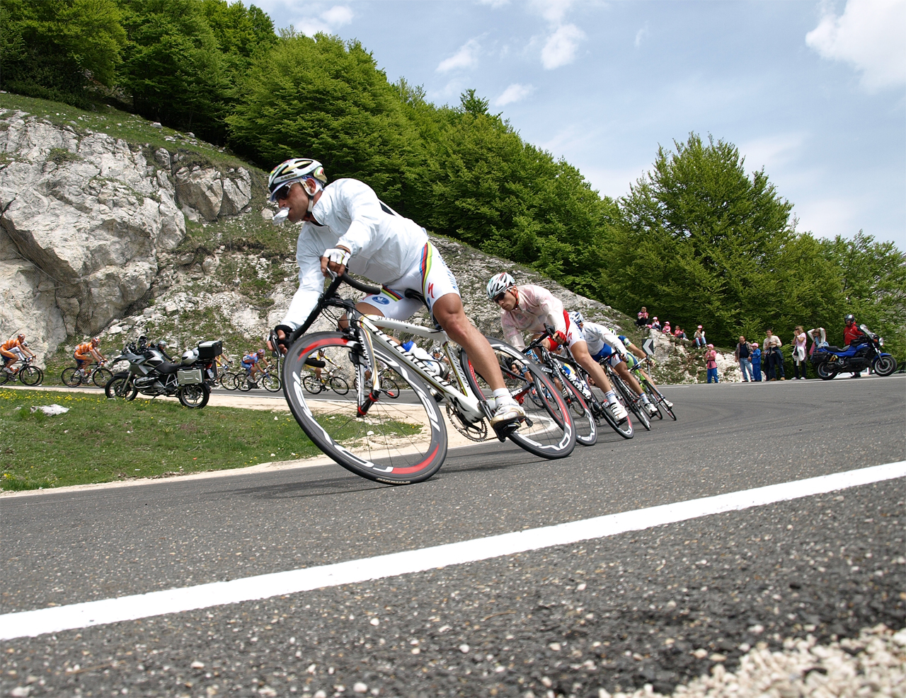 Scattata durante l'8° tappa (17/05/2008) in località Forca d'Acero (FR) World champion Paolo Bettini on "Giro d'Italia"